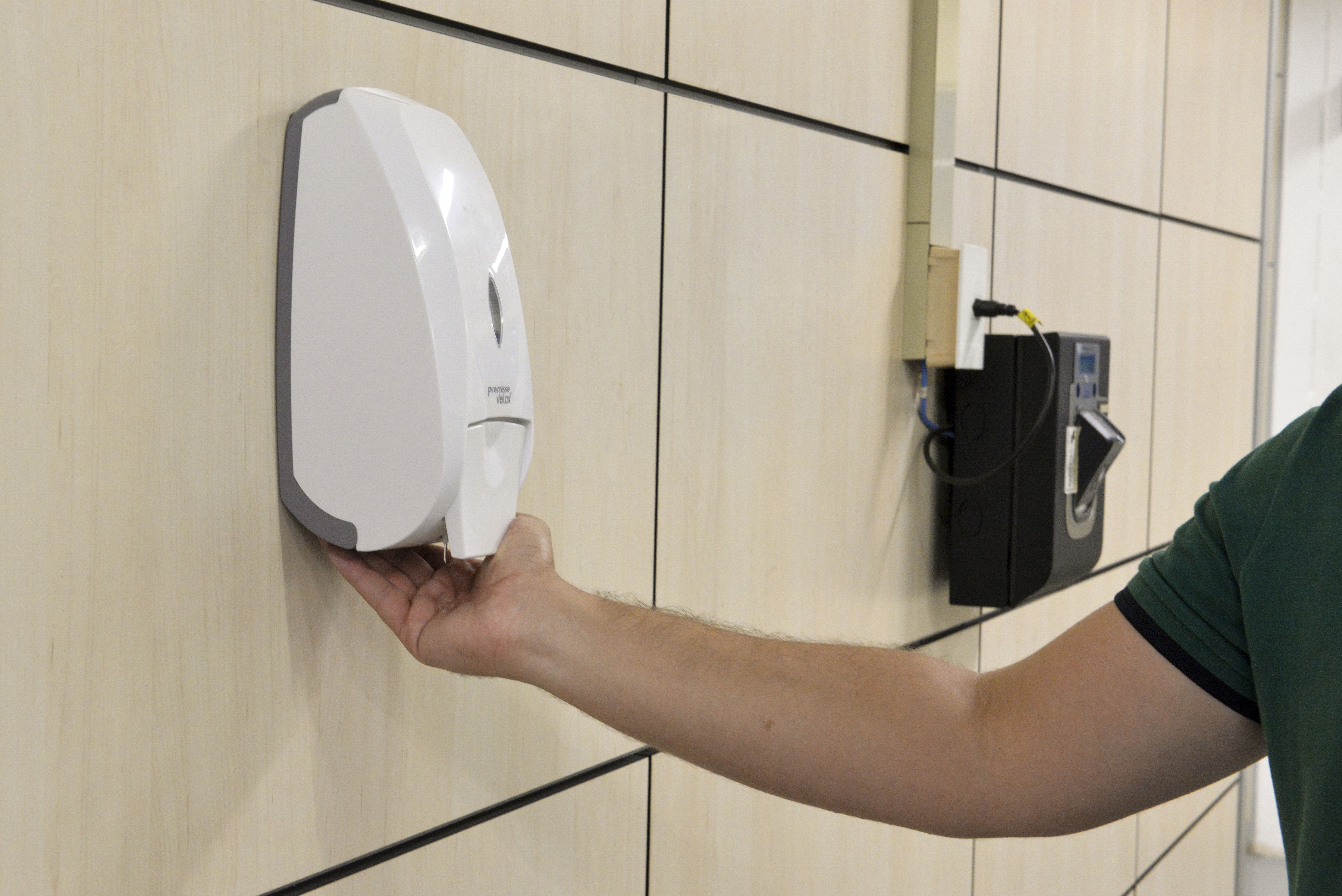 Senado adota dispensadores de álcool em gel ao lado de coletores biométricos. O primeiro teste positivo para coronavírus em Brasília, confirmado na tarde dessa quinta-feira (5), aumenta o alerta para a necessidade de hábitos simples de higiene para prevenir contaminação. A Secretaria de Patrimônio (Spatr), com o aval da Diretoria-Geral (DGer), intensificou os cuidados internos ao instalar dispensadores de álcool em gel ao lado de todos os 82 coletores biométricos instalados nos prédios do Senado. Áreas comuns dos anexos I e II, que recebem um grande volume de pessoas diariamente, ganharam os dispositivos para uso de colaboradores e visitantes. Imagem: Dispensers para álcool gel são instalados na Secretaria de Comunicação do Senado Federal (Secom) para ajudar na prevenção do COVID-19, o novo coronavírus.